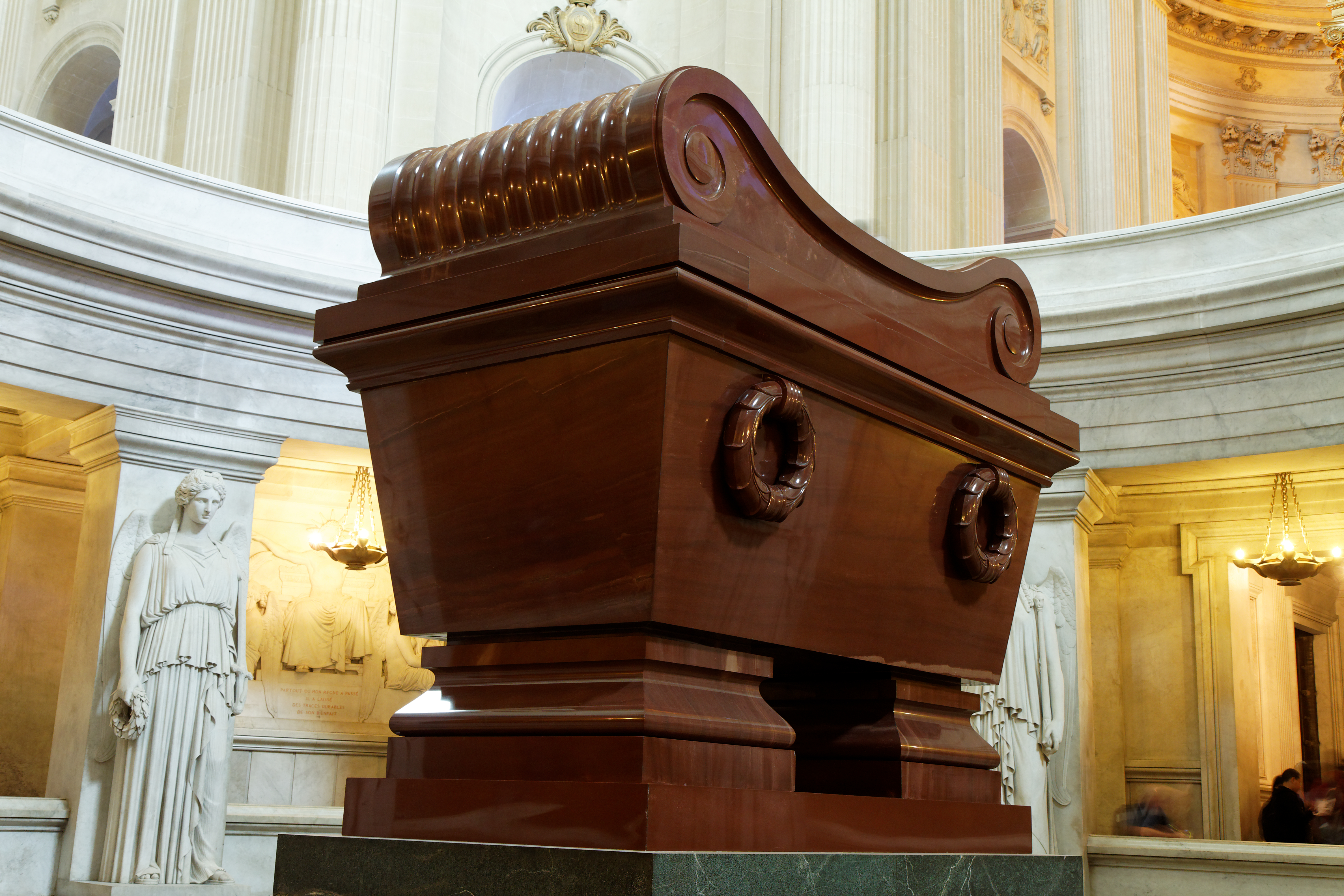 Le tombeau de Napoléon sous le dôme des Invalides.